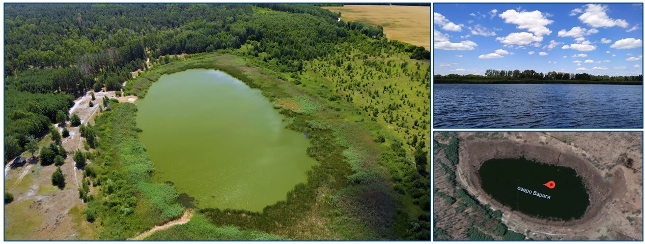 Озеро Варги (Варяги), розташоване біля села Савин